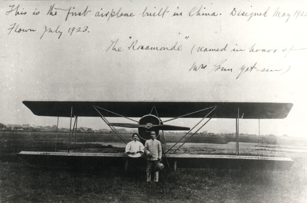 1923年7月，楊仙逸製成中國自行設計生產的以「樂士文」（Rosamonde，宋慶齡的英文名）命名的第一架軍用飛機，正式試航及命名典禮在大沙頭機場舉行。圖為孫中山和宋慶齡。